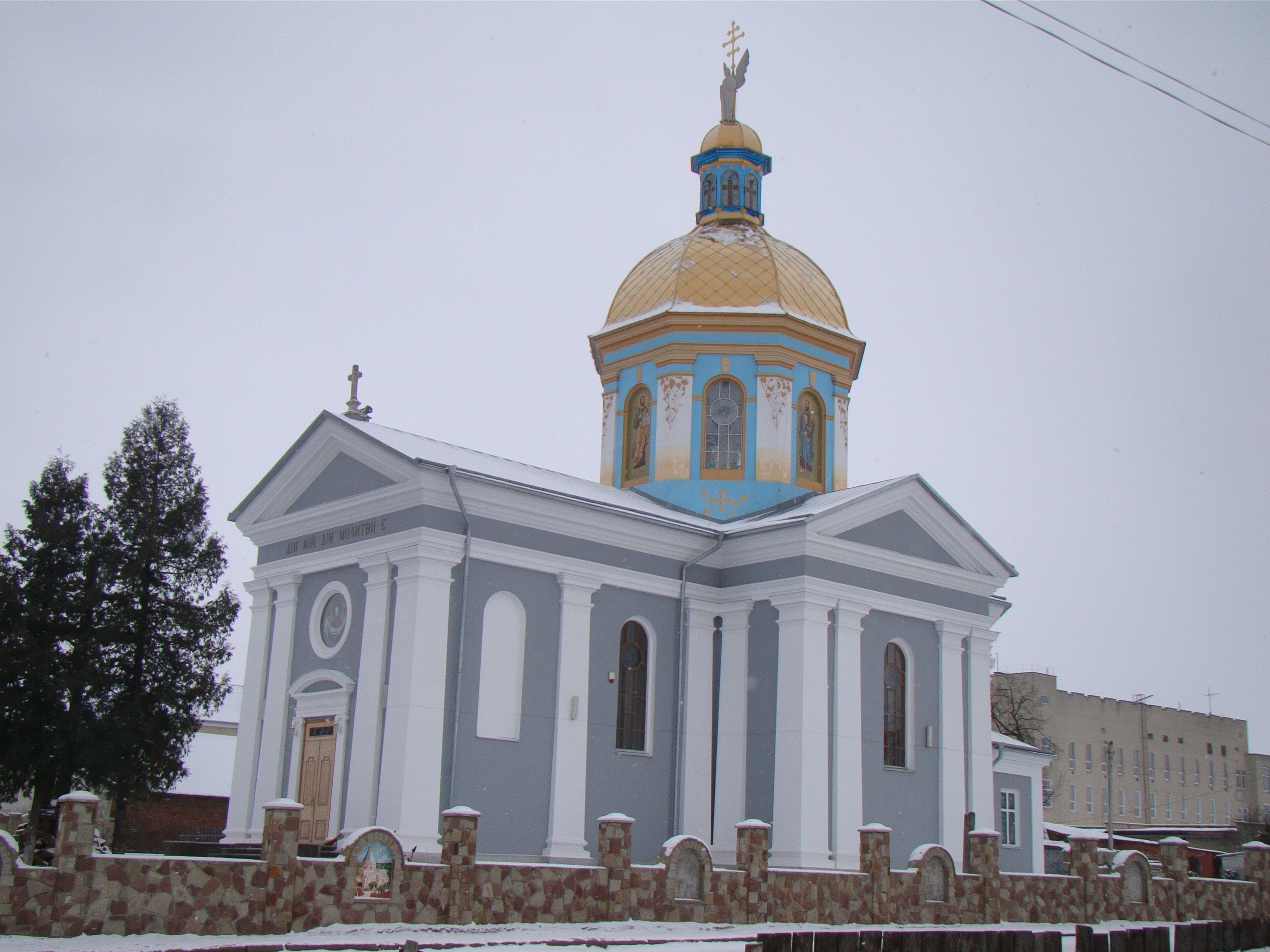 1885 рік.